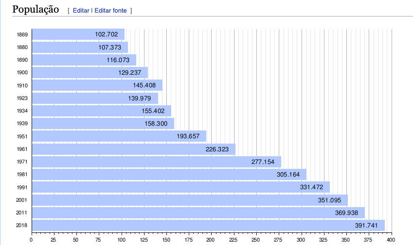 Foto mostrando a população de Vários Census de Vorarlberg